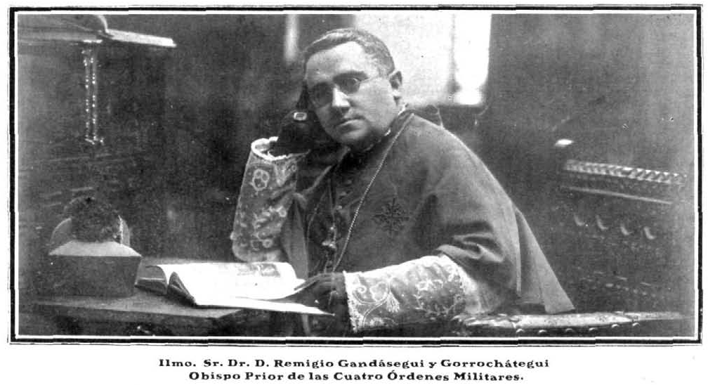 Remigio Gandásegui y Gorrochátegui, Obispo Prior de las Cuatro Órdenes Militares. Vida Manchega, Revista semanal ilustrada, Ciudad Real, 7 de marzo de 1912